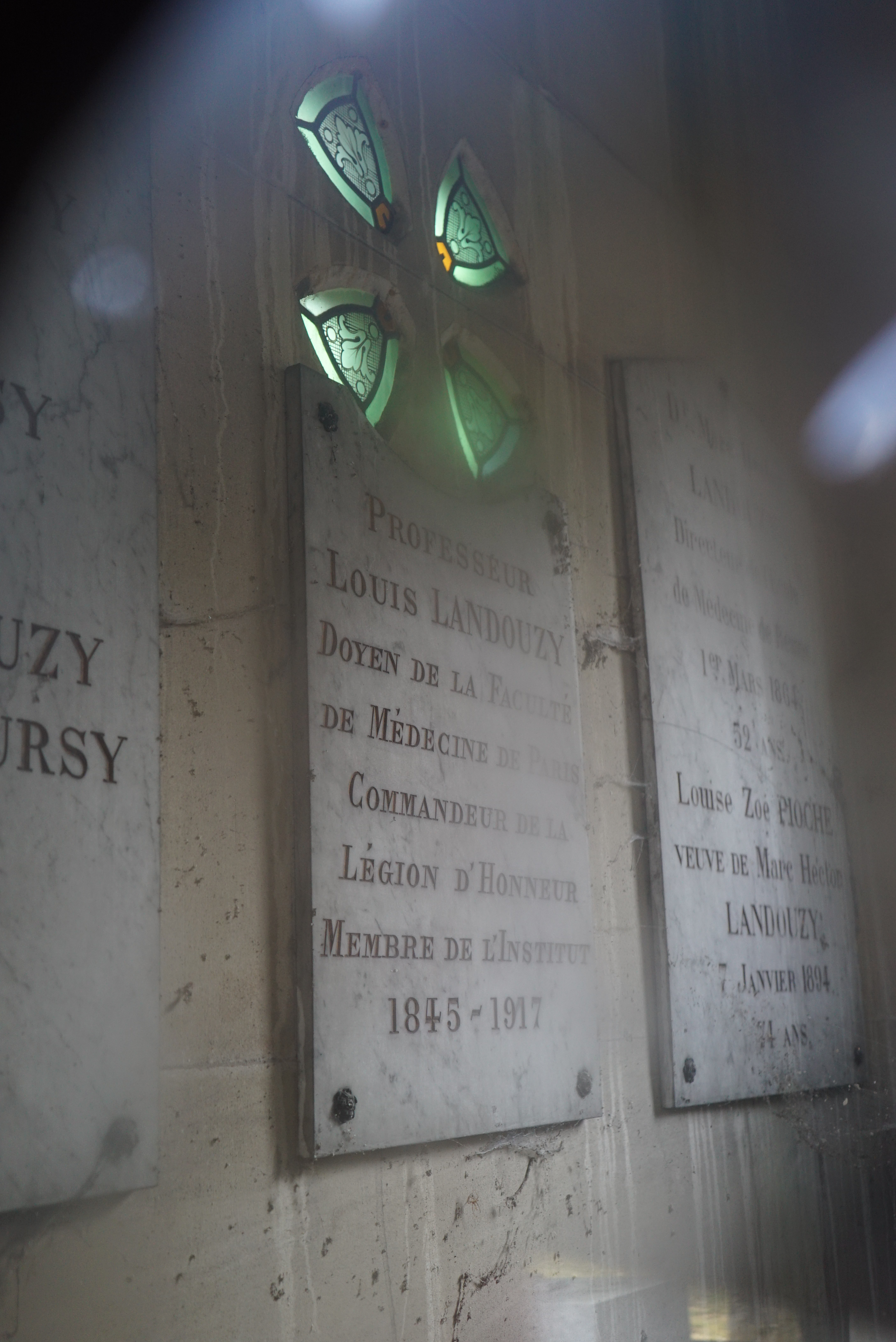 vue des plaques Landouzy.